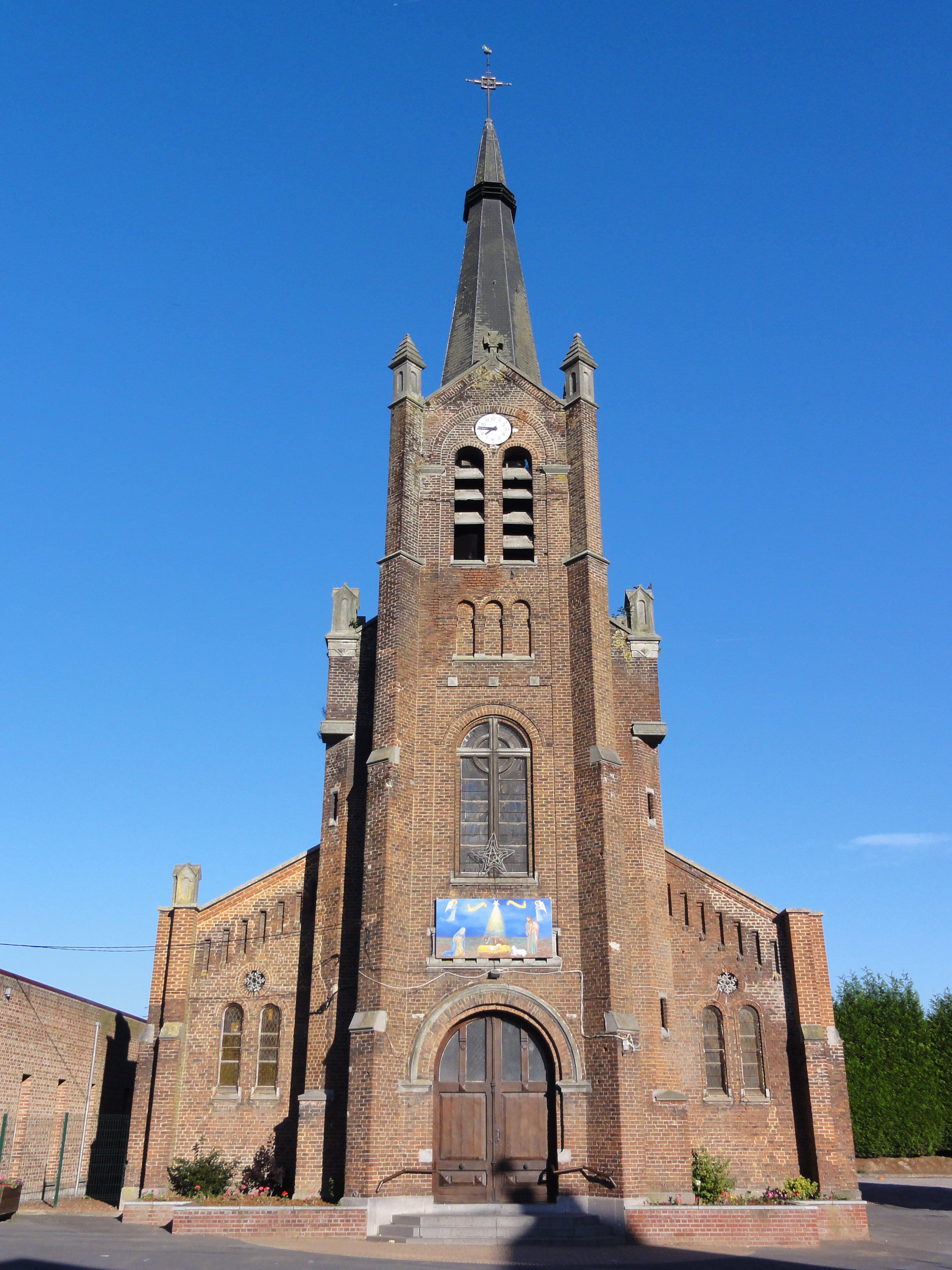 Neuf-Mesnil (Nord, Fr) église, façade.